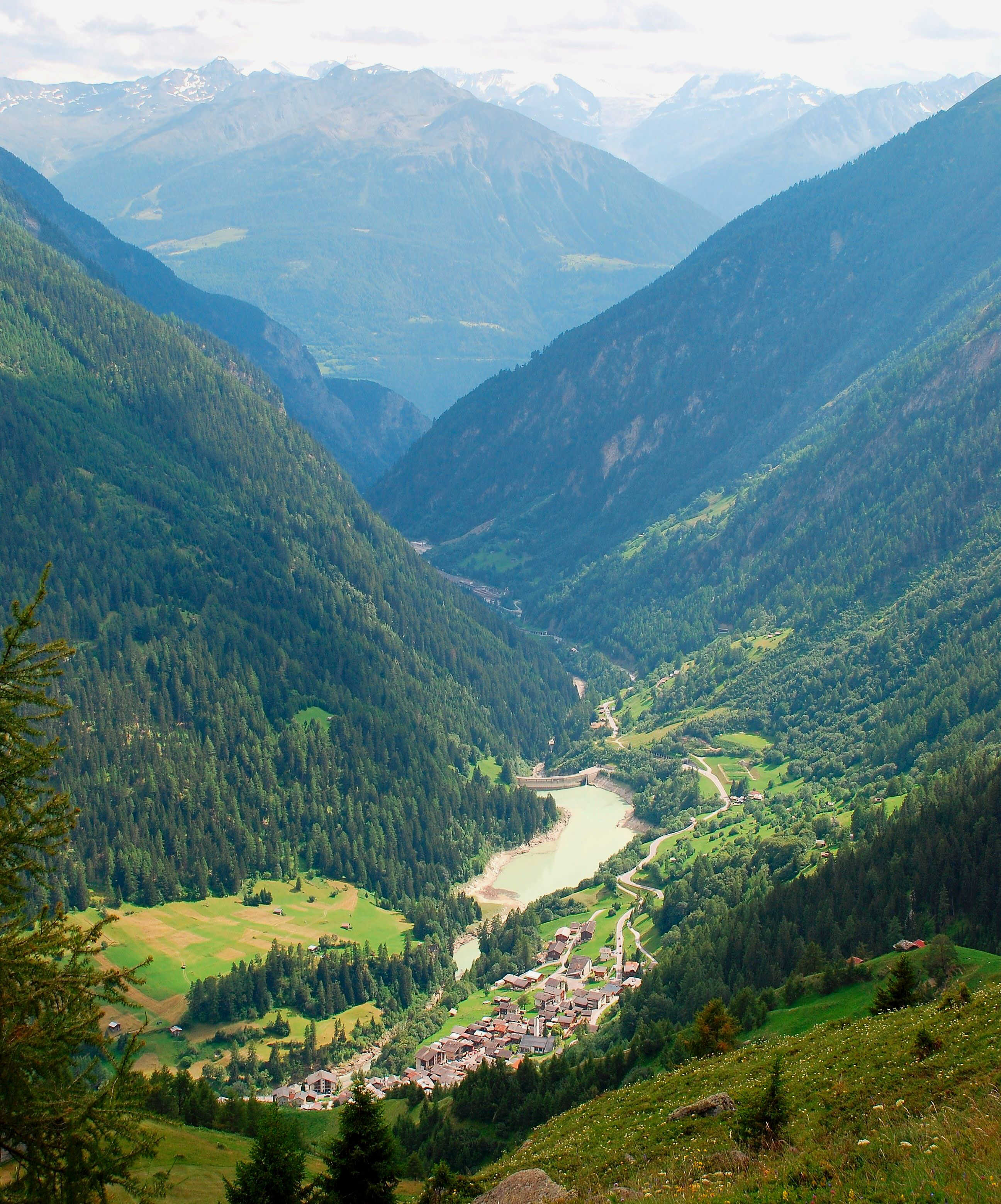 en.: Lötschental, Switzerland; dt.: Lötschental, Schweiz